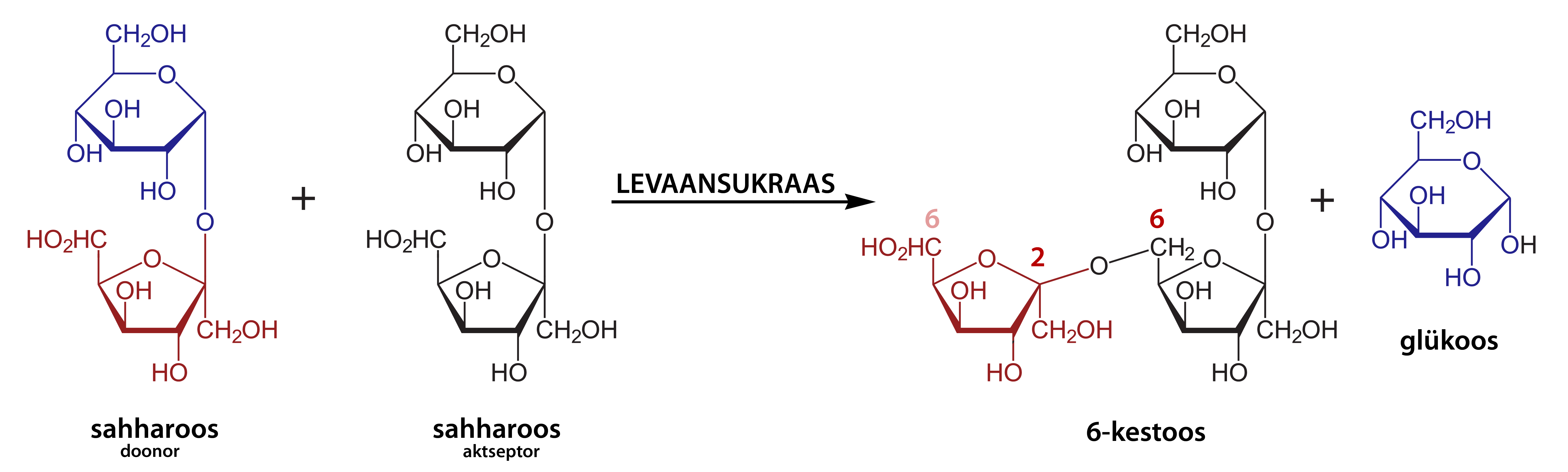 fruktoosi polümeriseerimine sahharoosist 6-kestoosiks